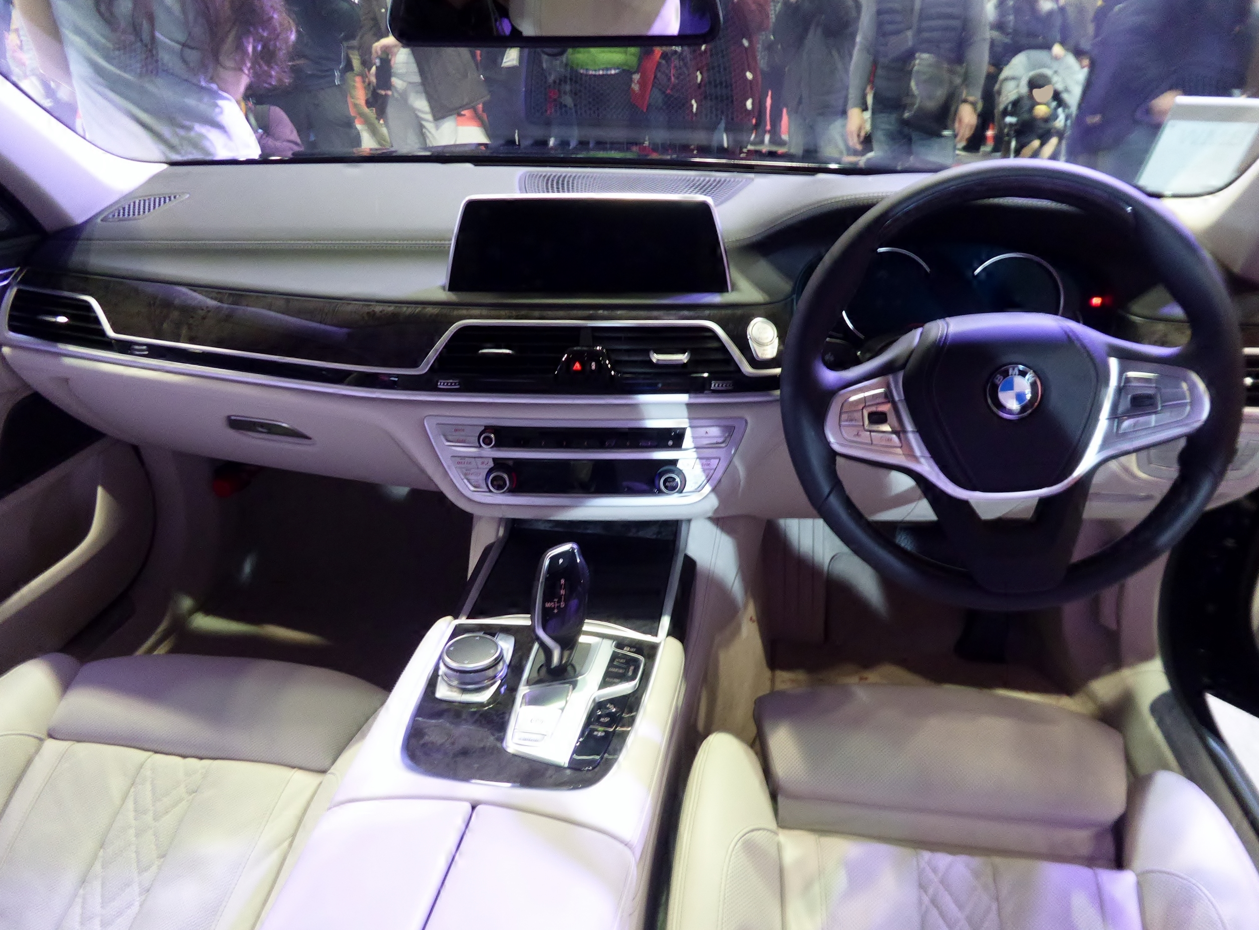 大阪モーターショー2017に於いてG11系BMW・740d xDrive Executiveを撮影。